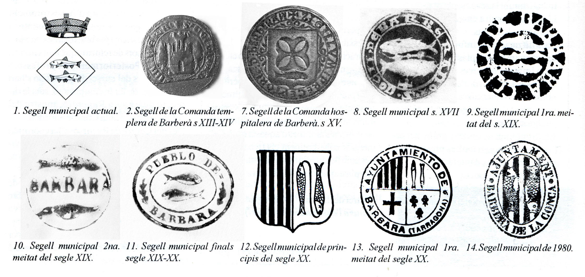 Origen i evolución del segell municipal de Barberà (s. XIII-XX).